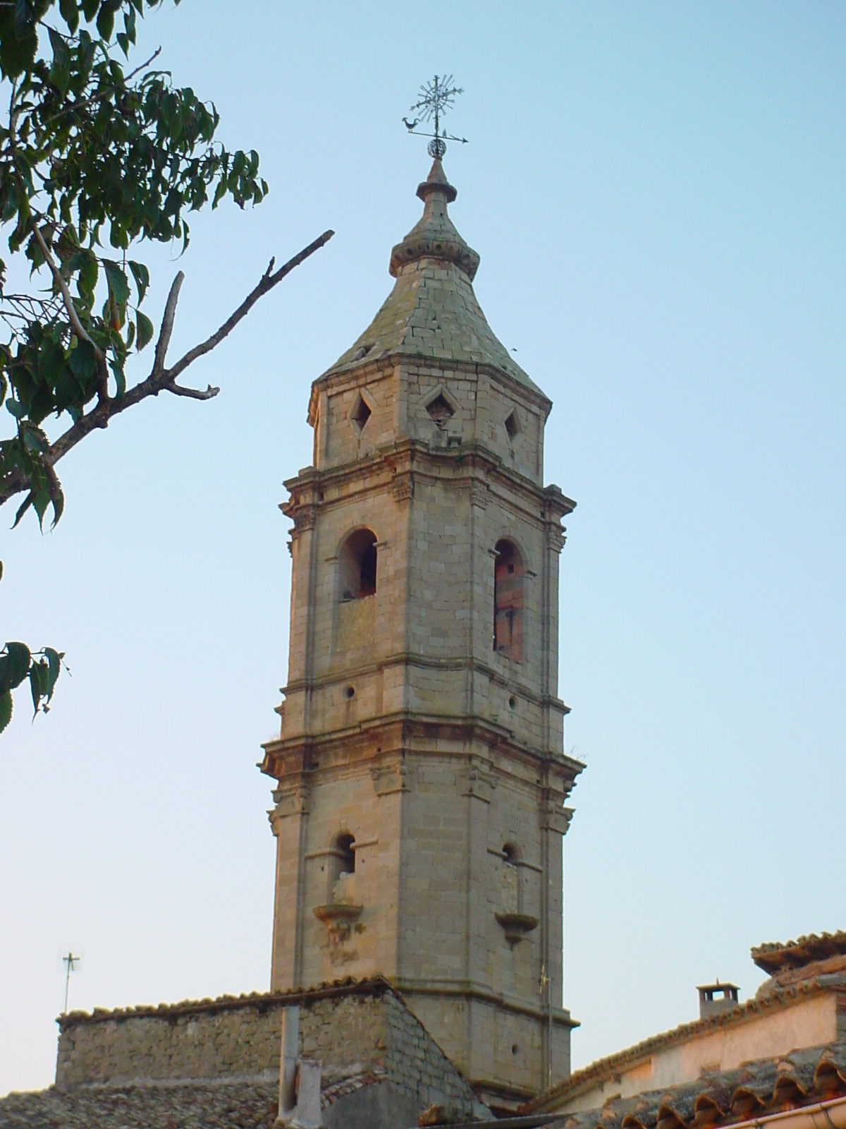 Eglise San Pedro (XIVème siècle)